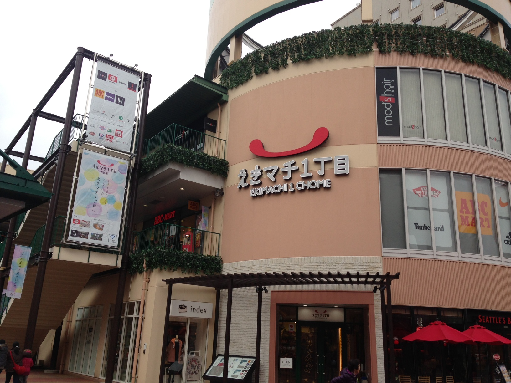 JR九州グループが運営する商業施設、えきマチ1丁目佐世保